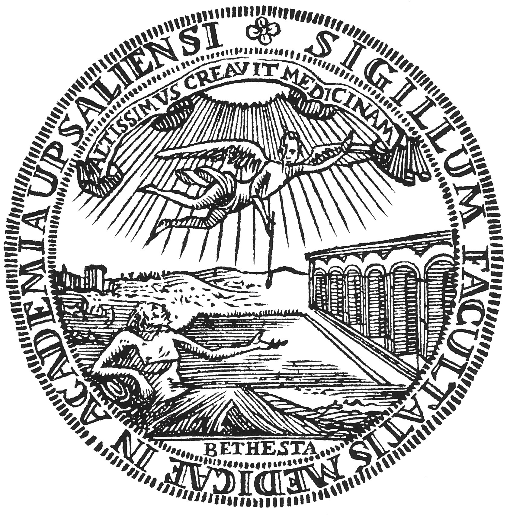 Medicinska fakulteten vid Uppsala universitets inofficiella sigill, upprättat ca. 1640. Efter avbildningar i Johan Eenbergs Uppsalabeskrivning (1704). Källa: Sven Lindroth, Uppsala universitet 1477-1977, s. 53.